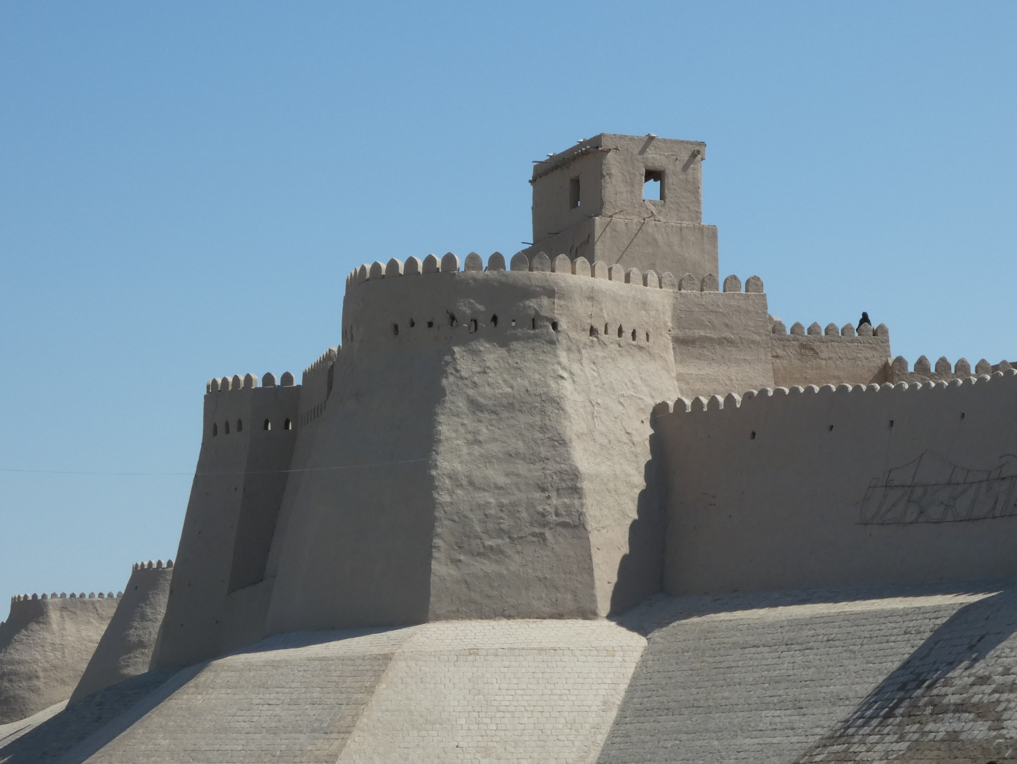 Konya Ark, Chiwa, Außenansicht